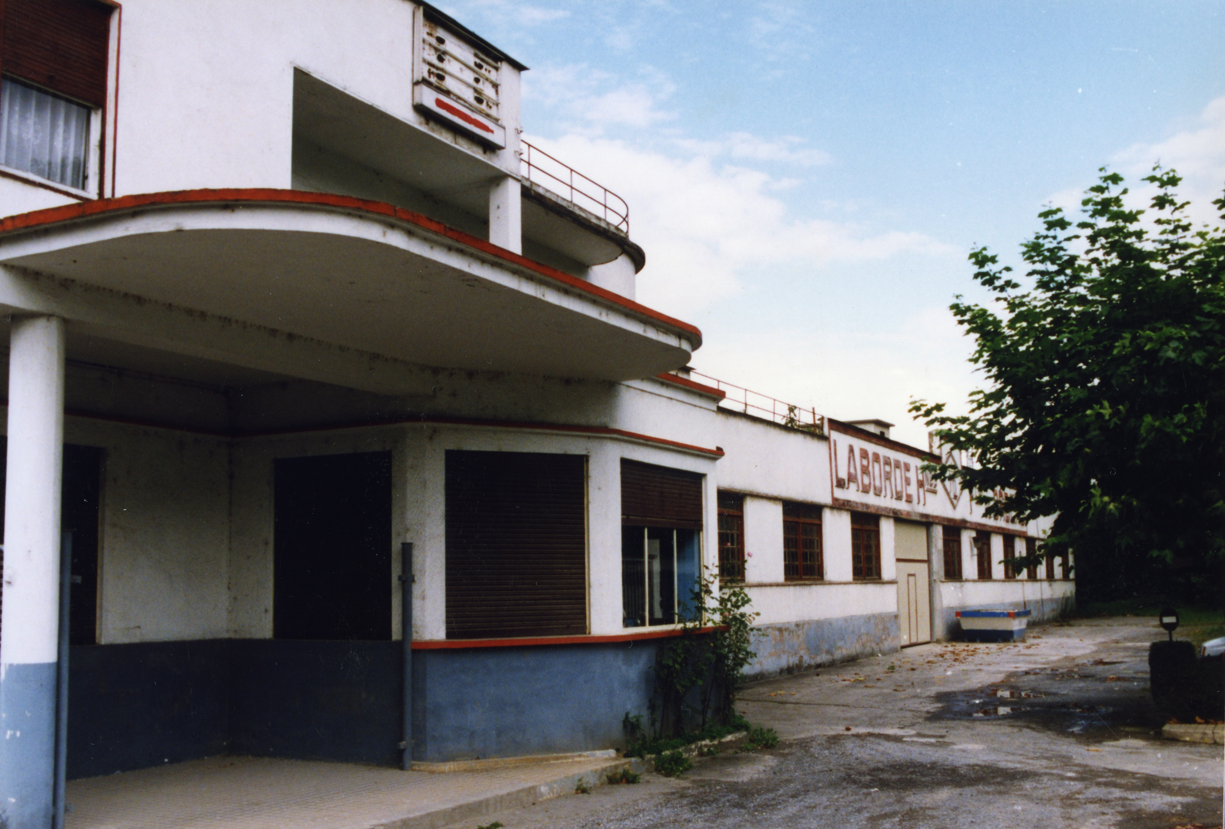 Laborde hermanos eraikina. Aiurri 5 zbk. 5. orr.